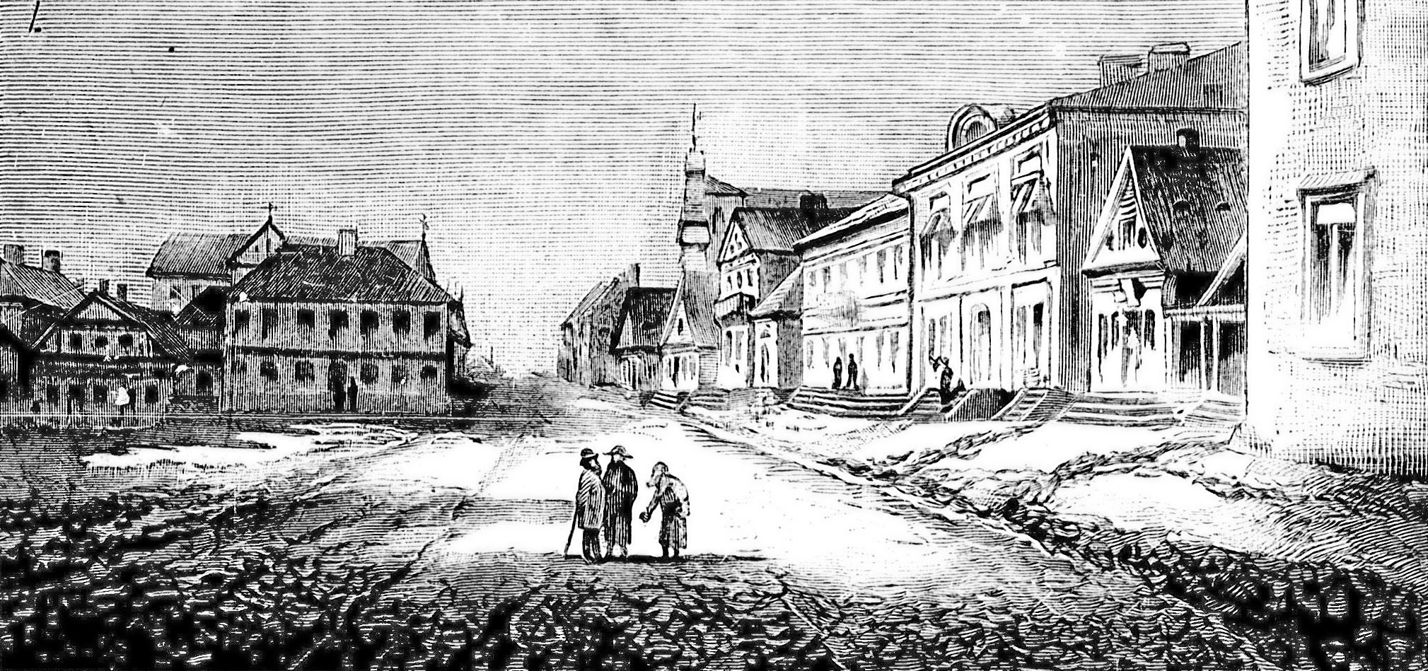 Беларуская (тарашкевіца): Наваградак (Navahradak), рог пляцу Рынку (plac Rynak) і вуліцы Францішканскай (vulica Franciškanskaja)